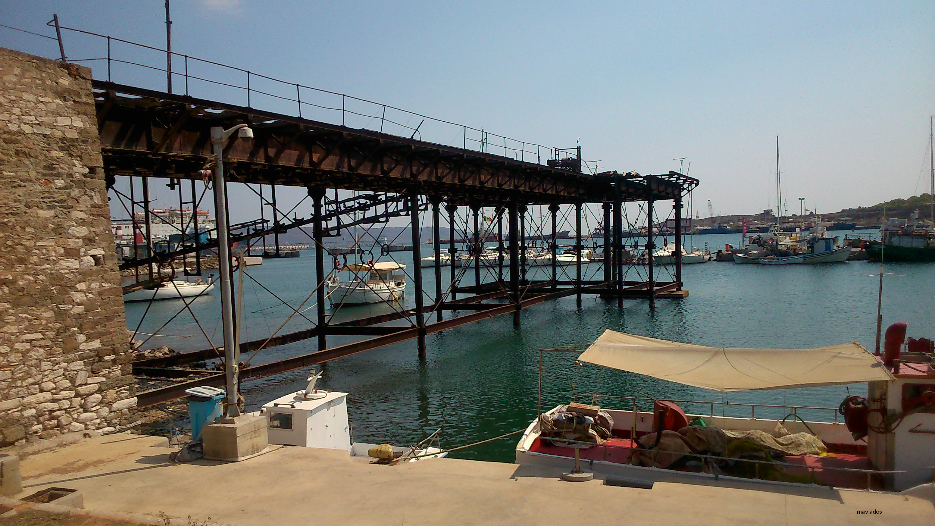 Η Γαλλική Μεταλλευτική Σκάλα Λαυρίου